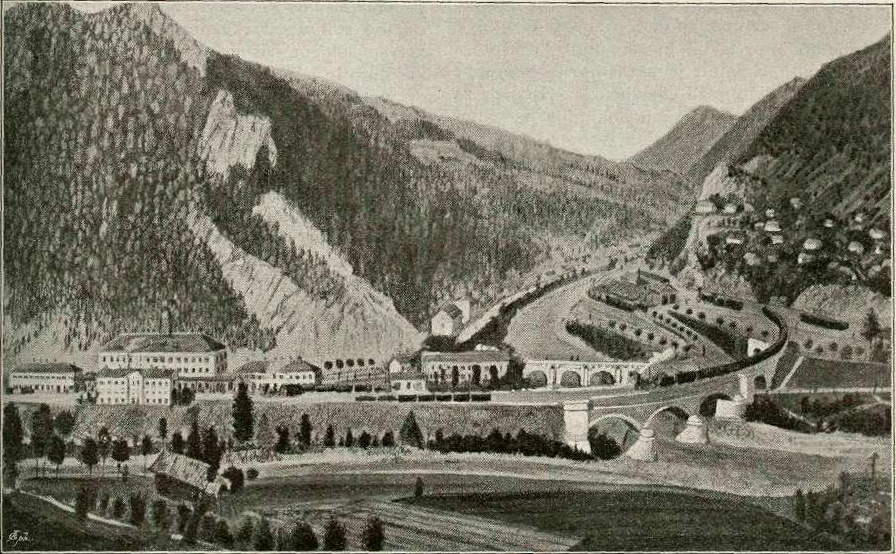 Zidani most ob južni železnici.